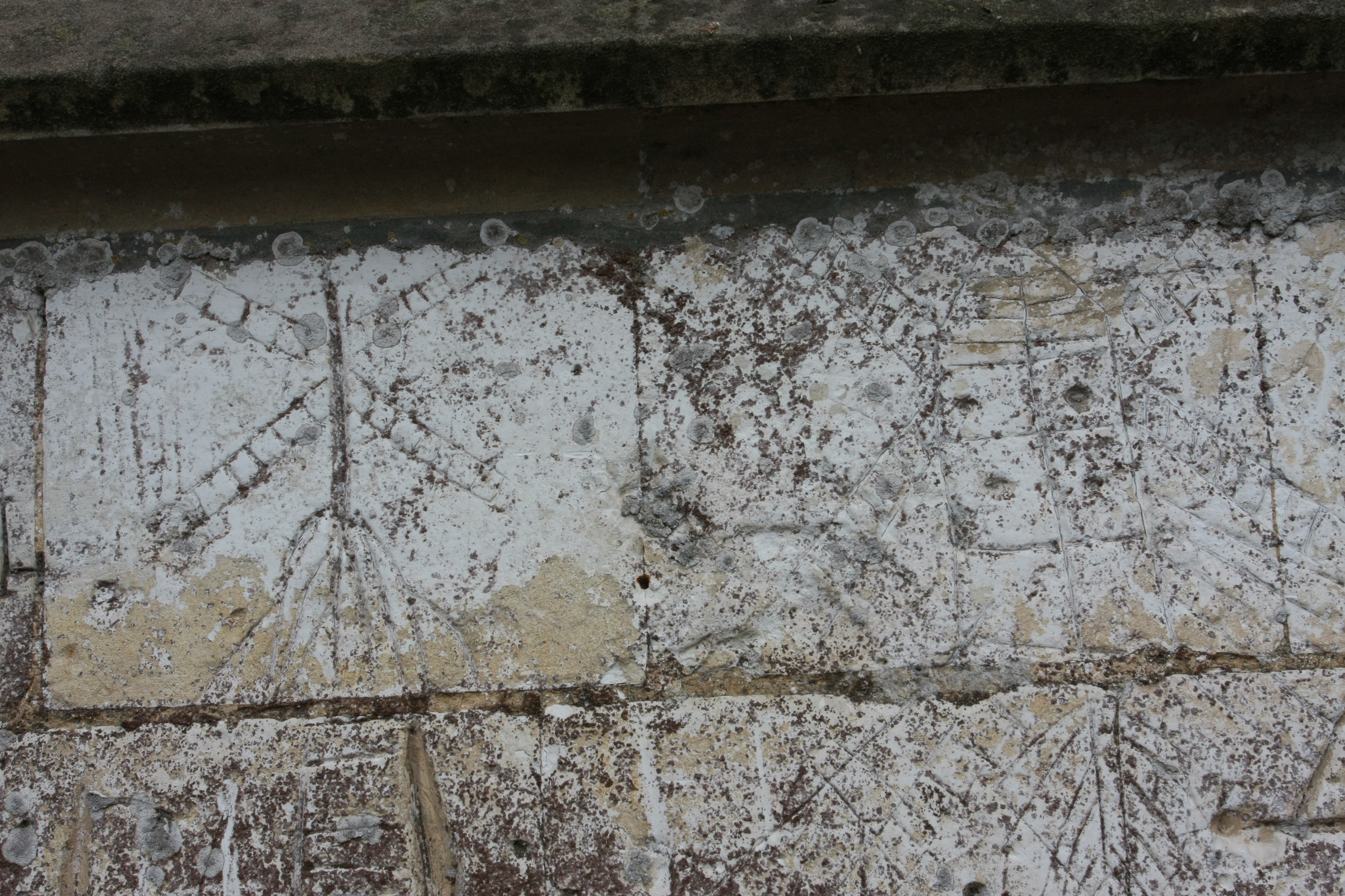 Grafitti sur l'église Marie Madeleine d'Acheux en Vimeu représentant un moulin, XVIe-XVIIIe siècle?